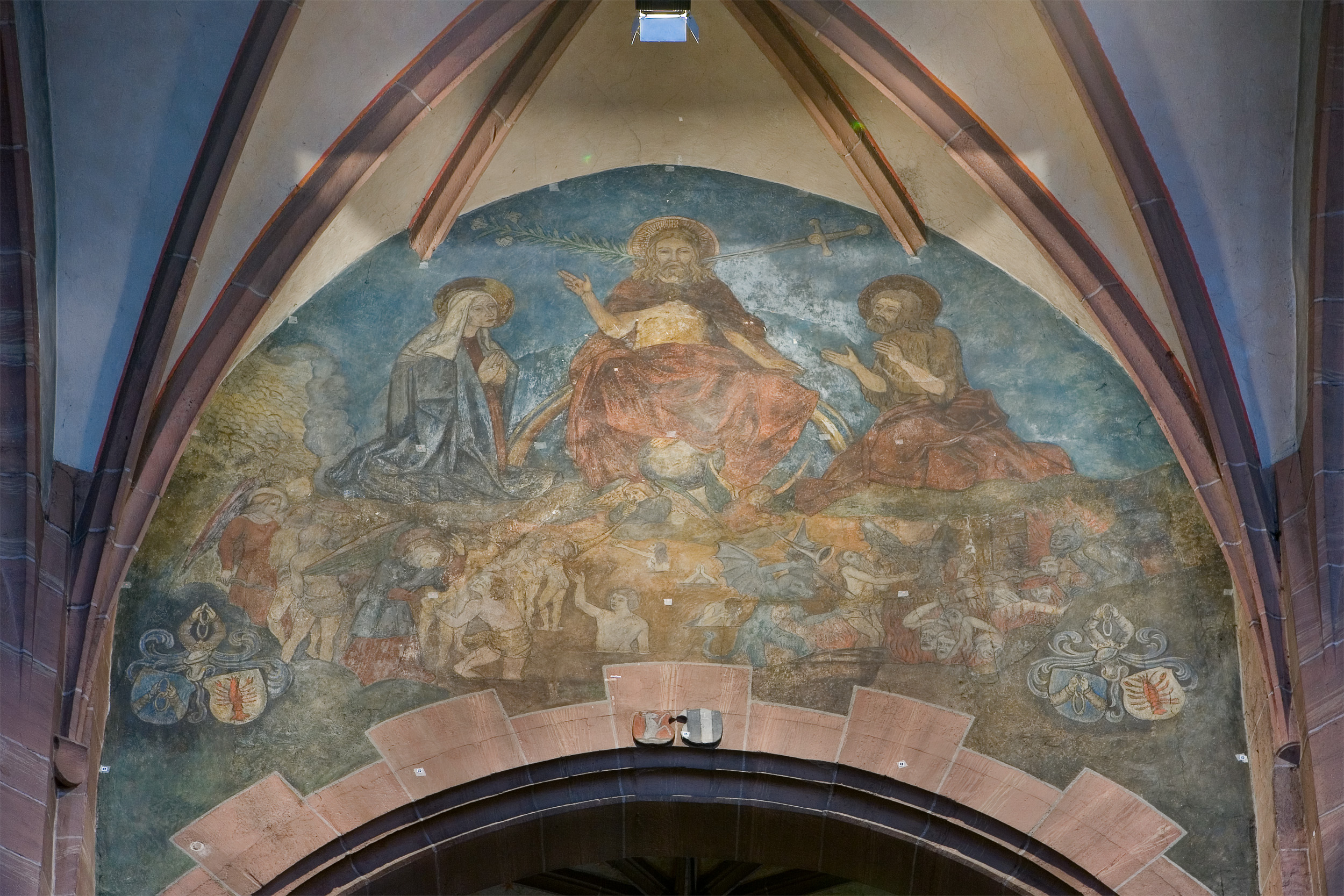 Mittelalterliche Wandmalerei (um 1500) auf dem Triumphbogen des Hochchors der Leonhardskirche in Frankfurt am Main. Selber fotografiert im März 2008, Doppellizensierung GFDL & CC-BY-SA 2.5.